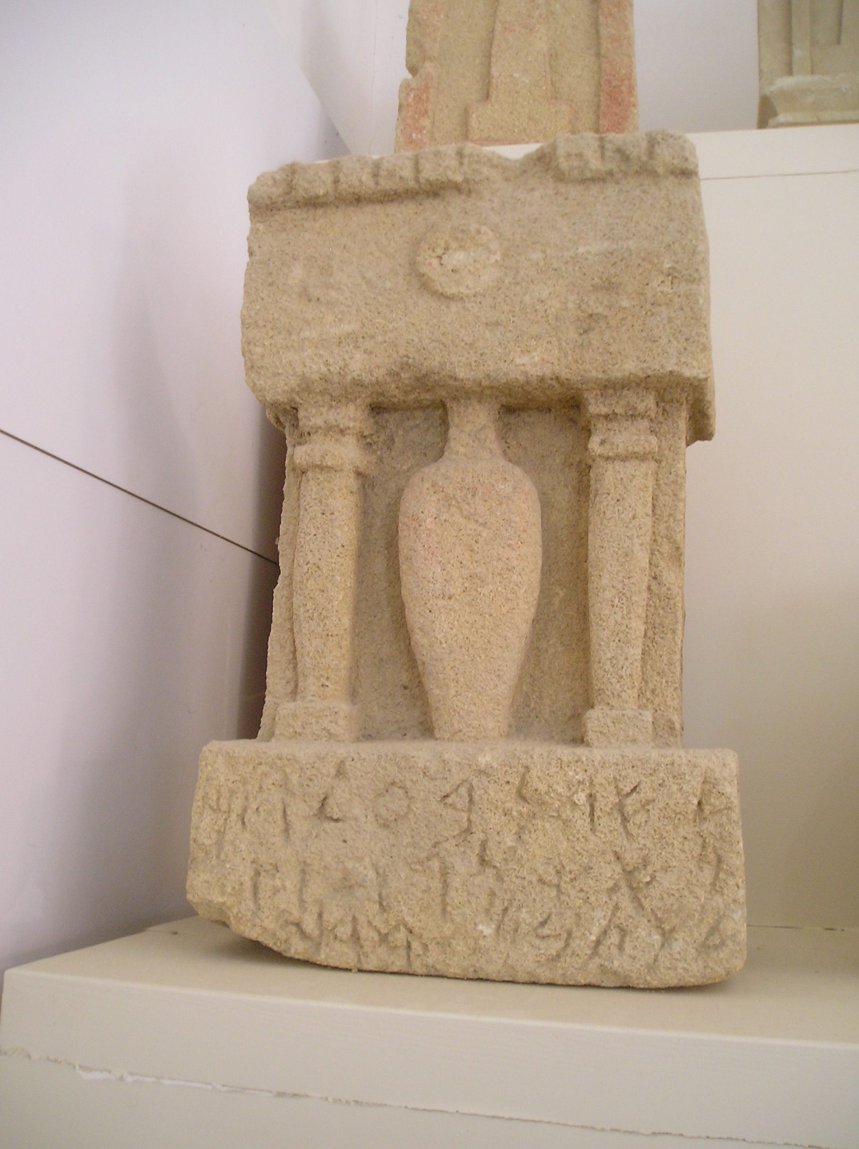 Museo Whitaker a Mozia: stele a rilievo punica.